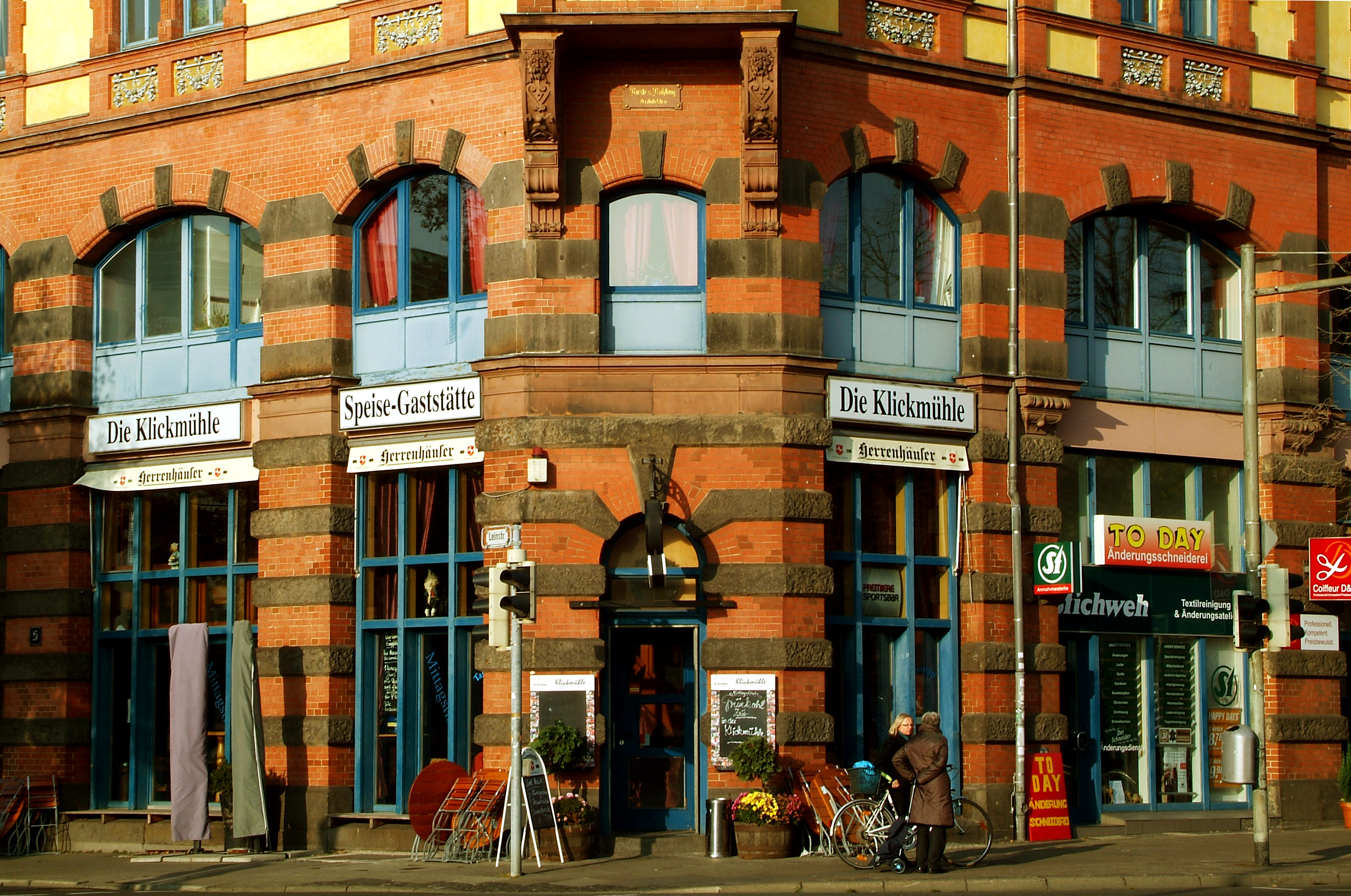 Leinstraße 25 in Hannover